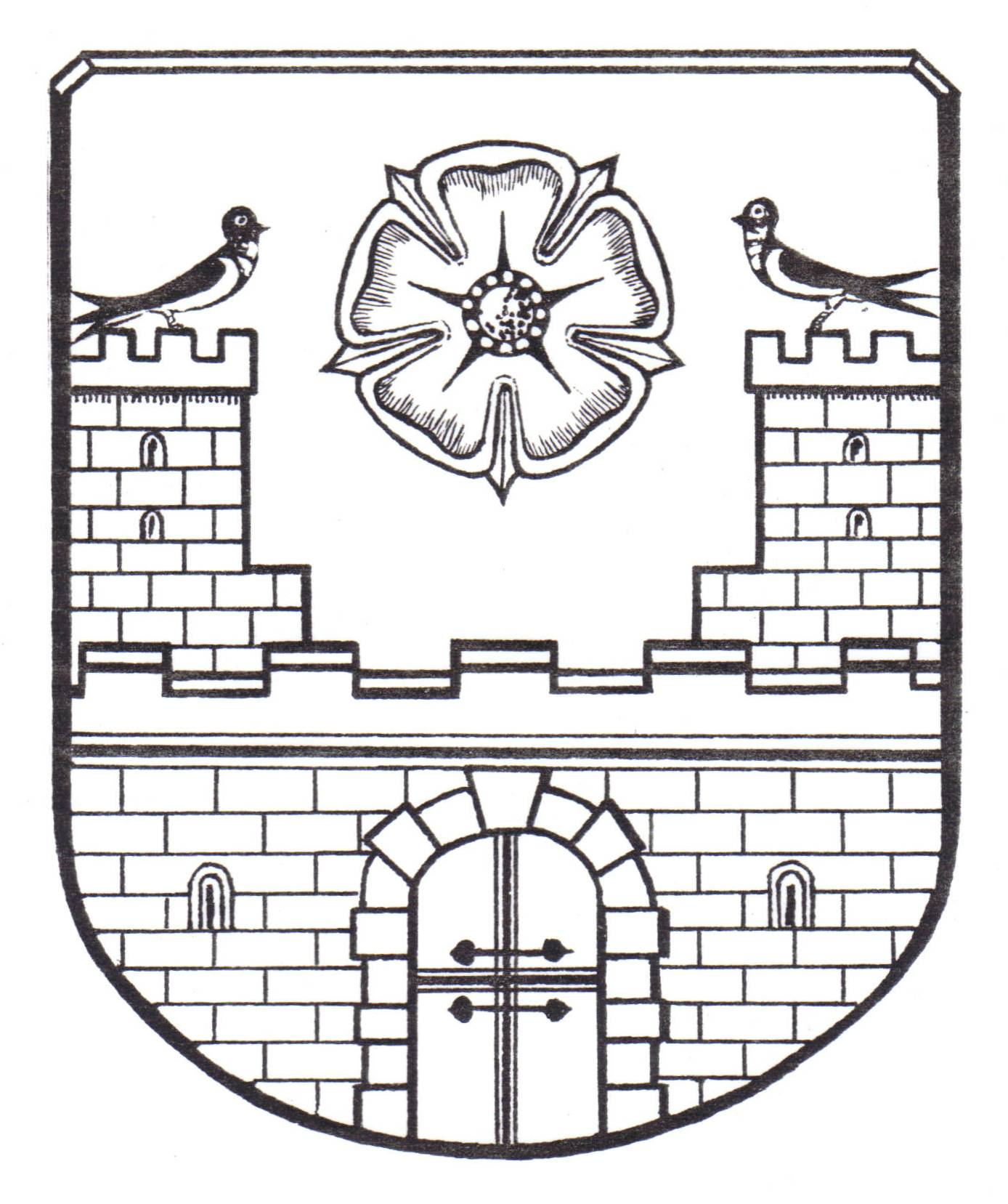 Original Wappenentwurf der ehemaligen Gemeinde Rischenau